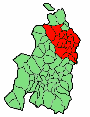 aipaturiko eskualdearen kokapena Nafarroa Beherean